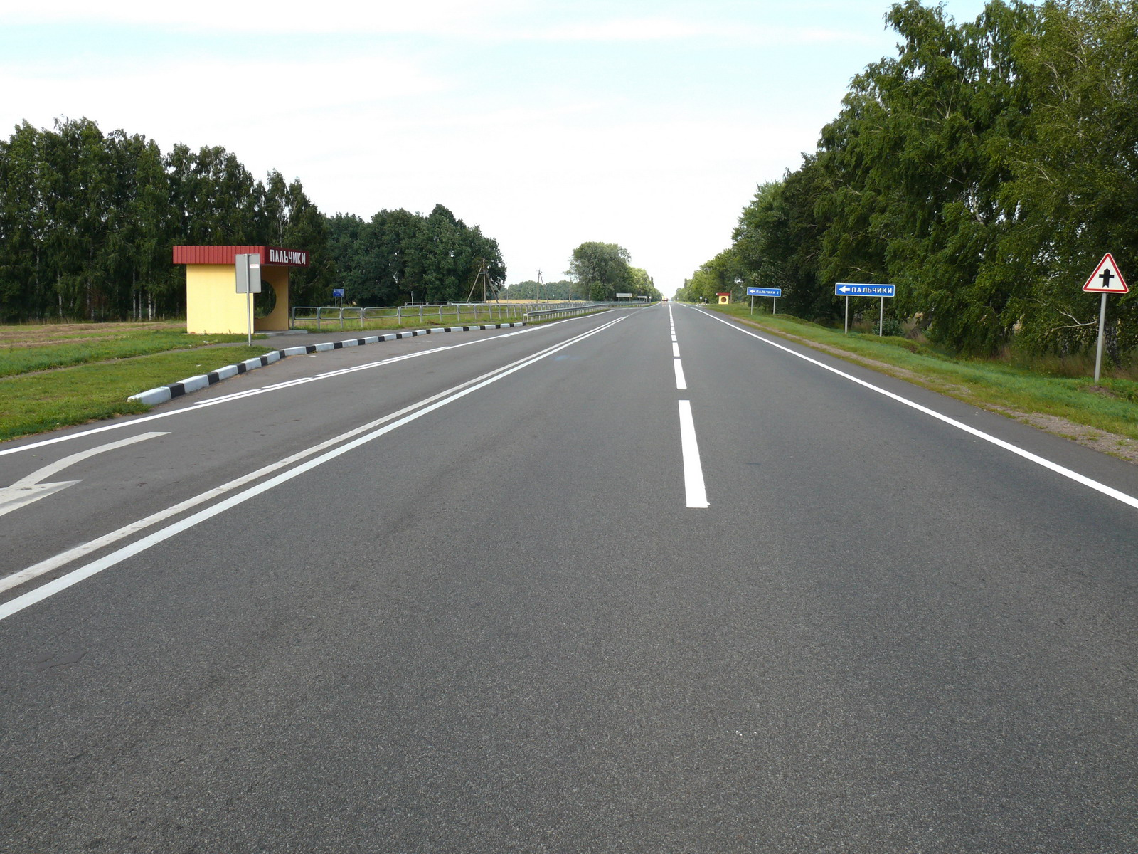 Автотрасса Е101, М02